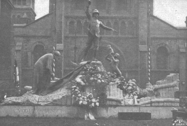 Monument voor Baron Francis Dhanis op de Zuiderlei (thans Amerikalei) te Antwerpen.